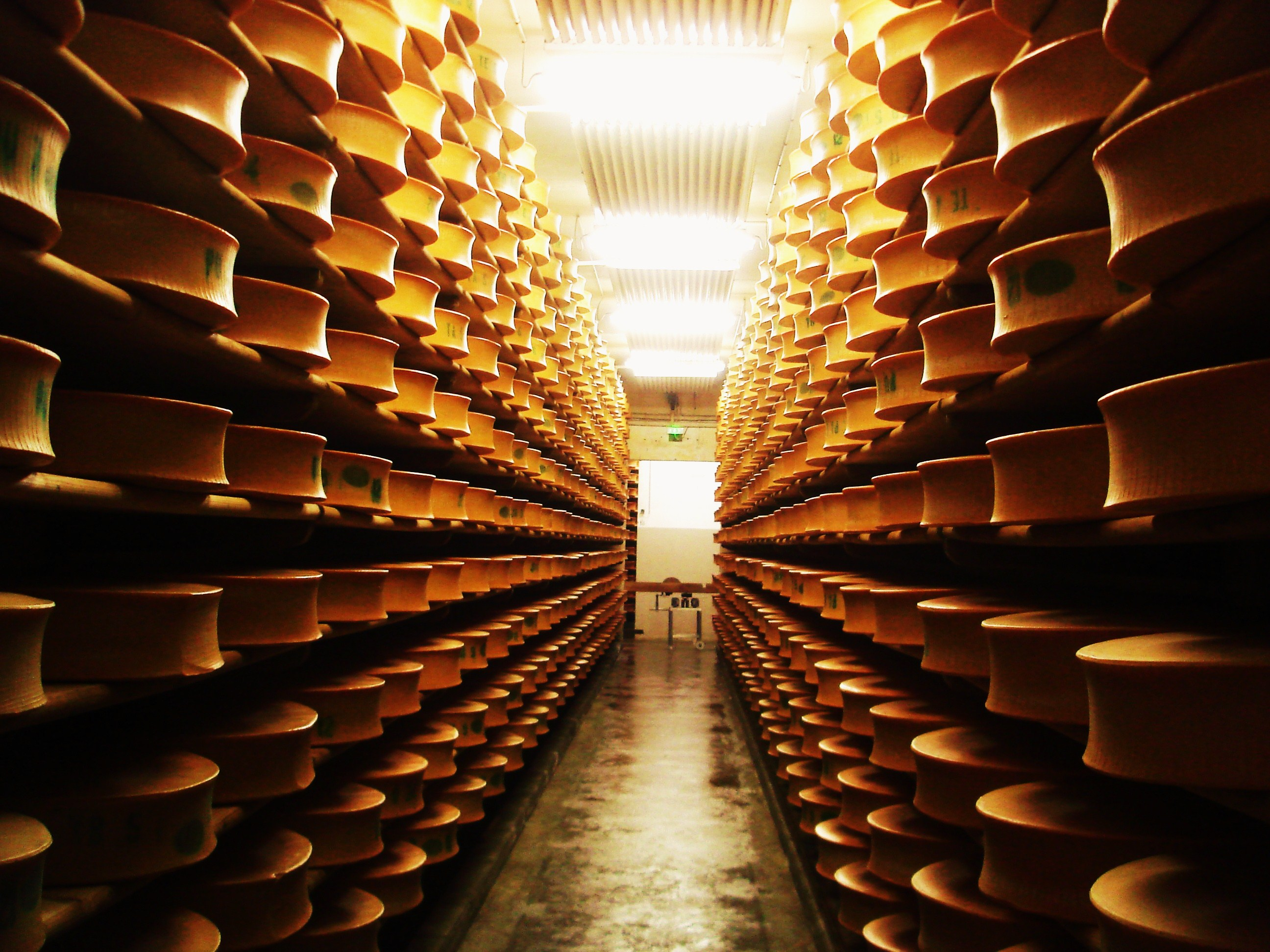 Stockage des meules des fromages de Beaufort pour l'affinage.